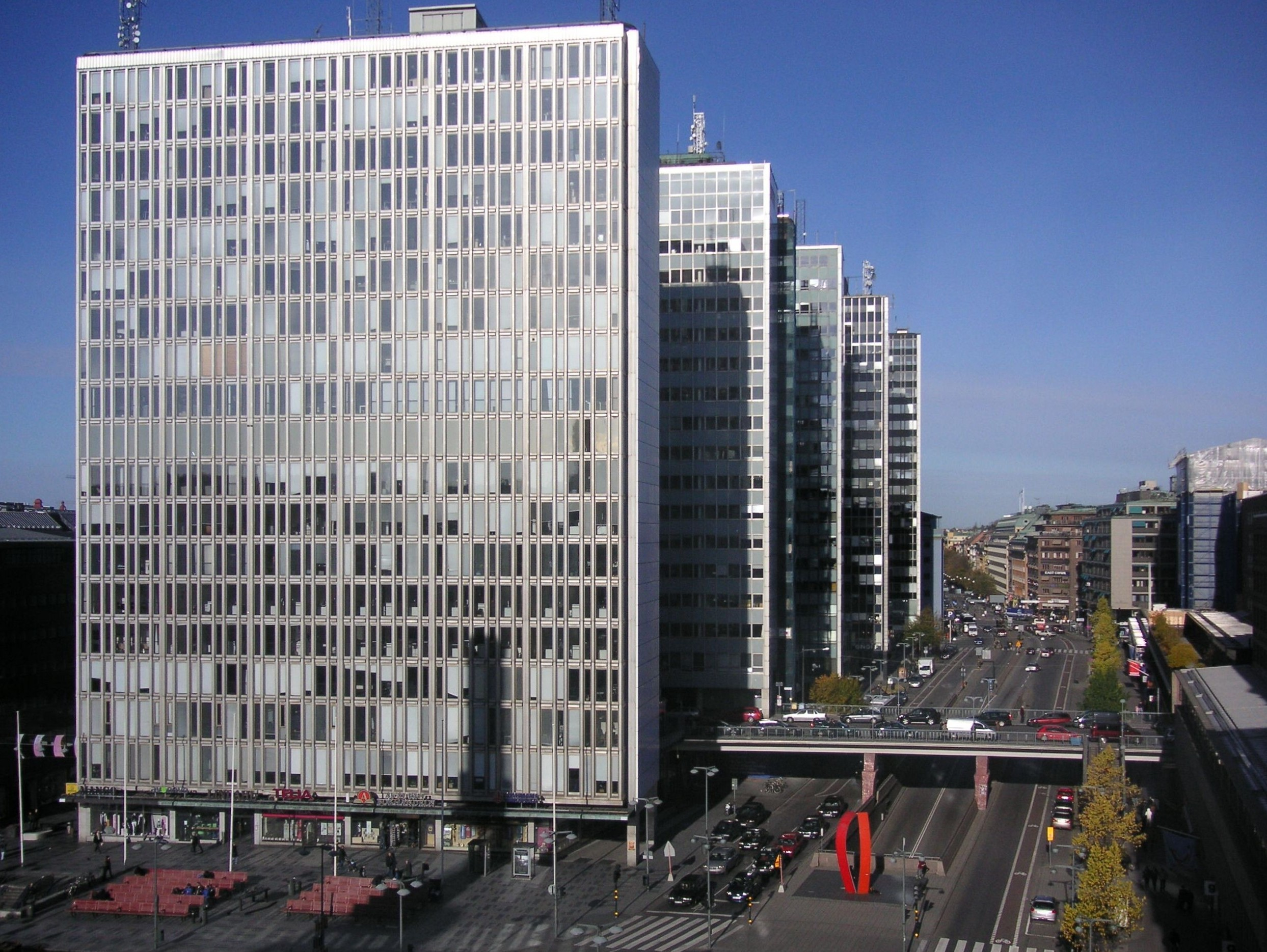 Hötorgets höghus 1-5 i Stockholm, närmast kameran är höghus nr 5.